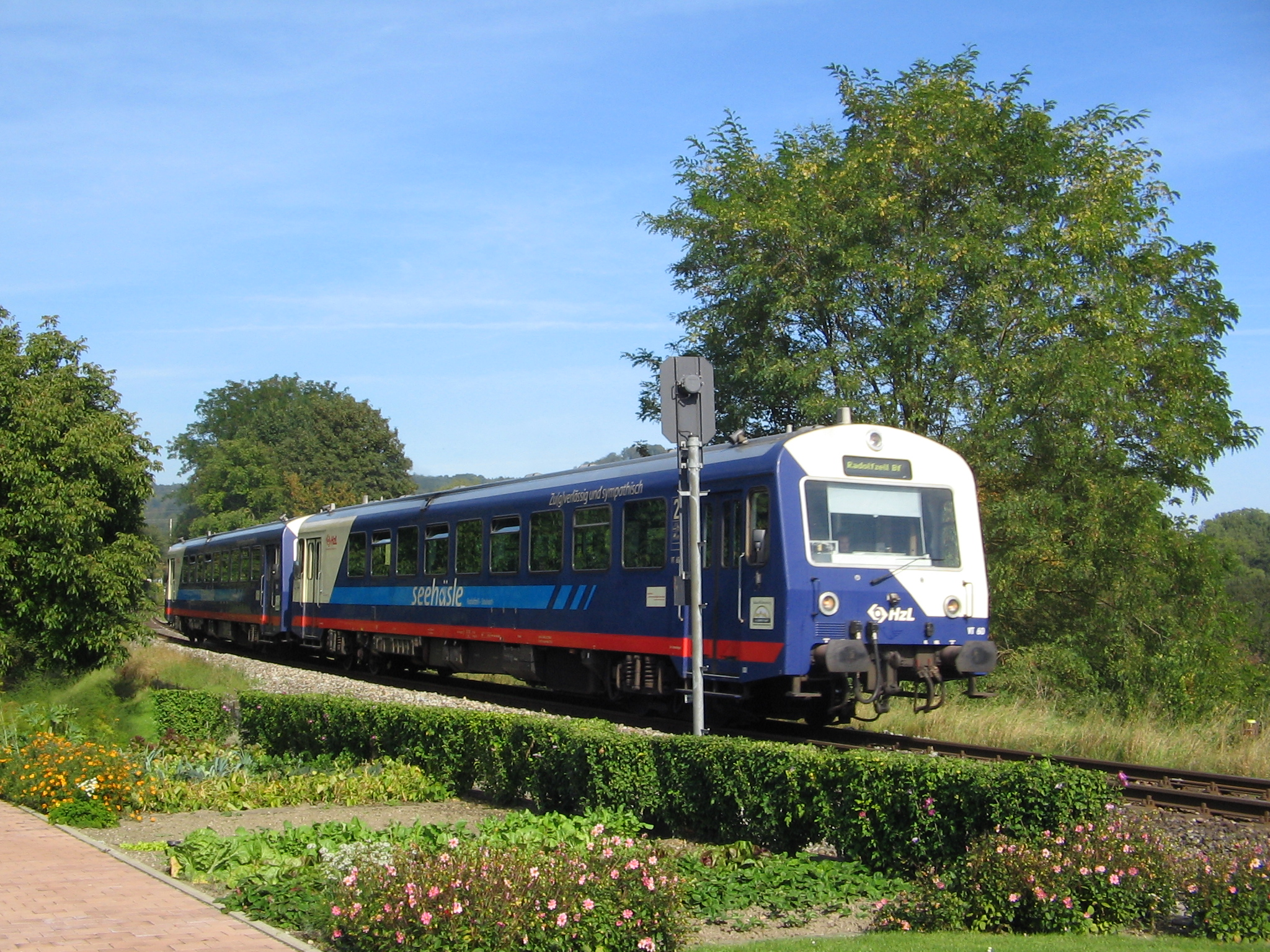 Zug auf dem Seehäsle